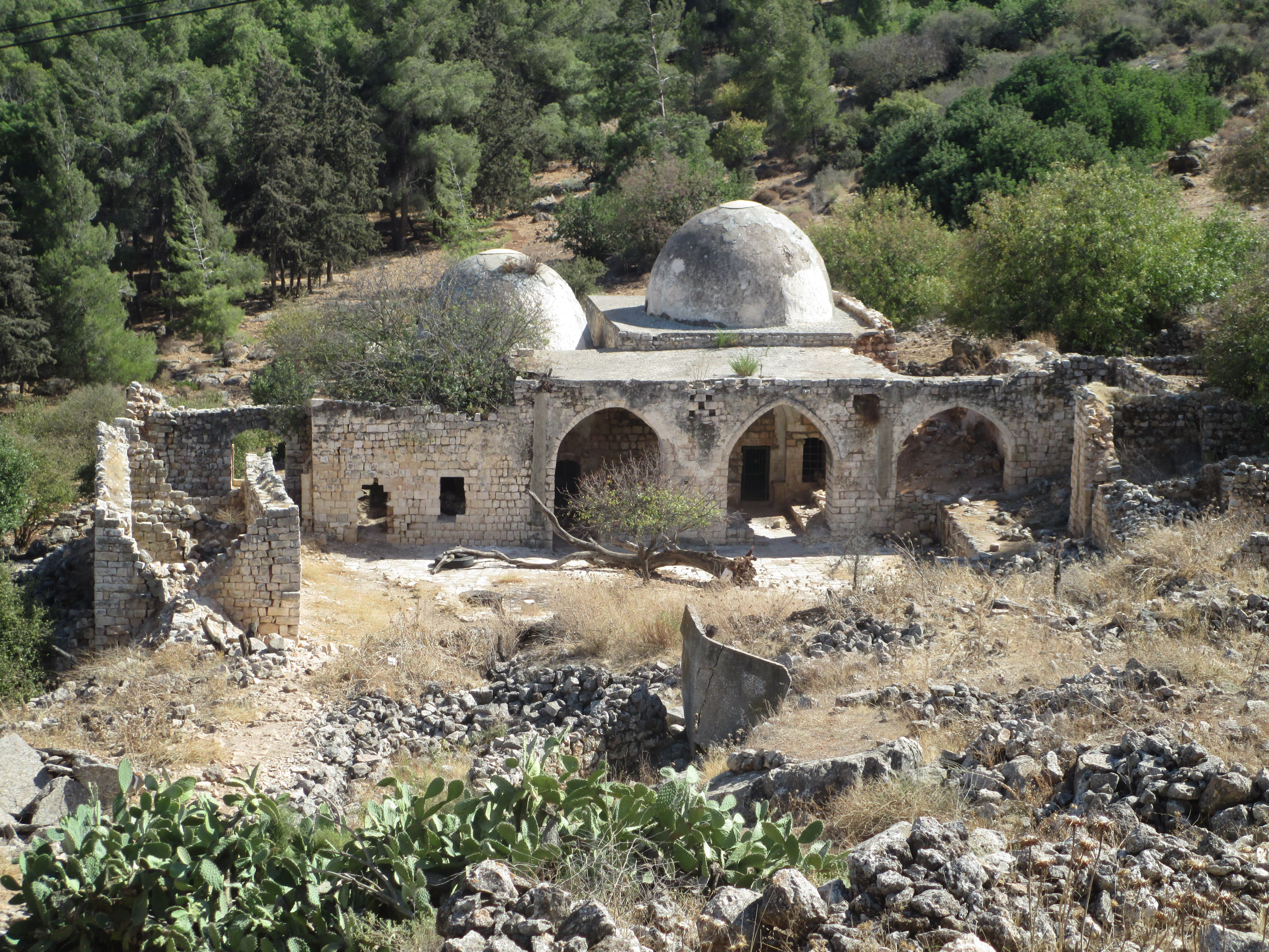 המסגד בכפר נבי יושע